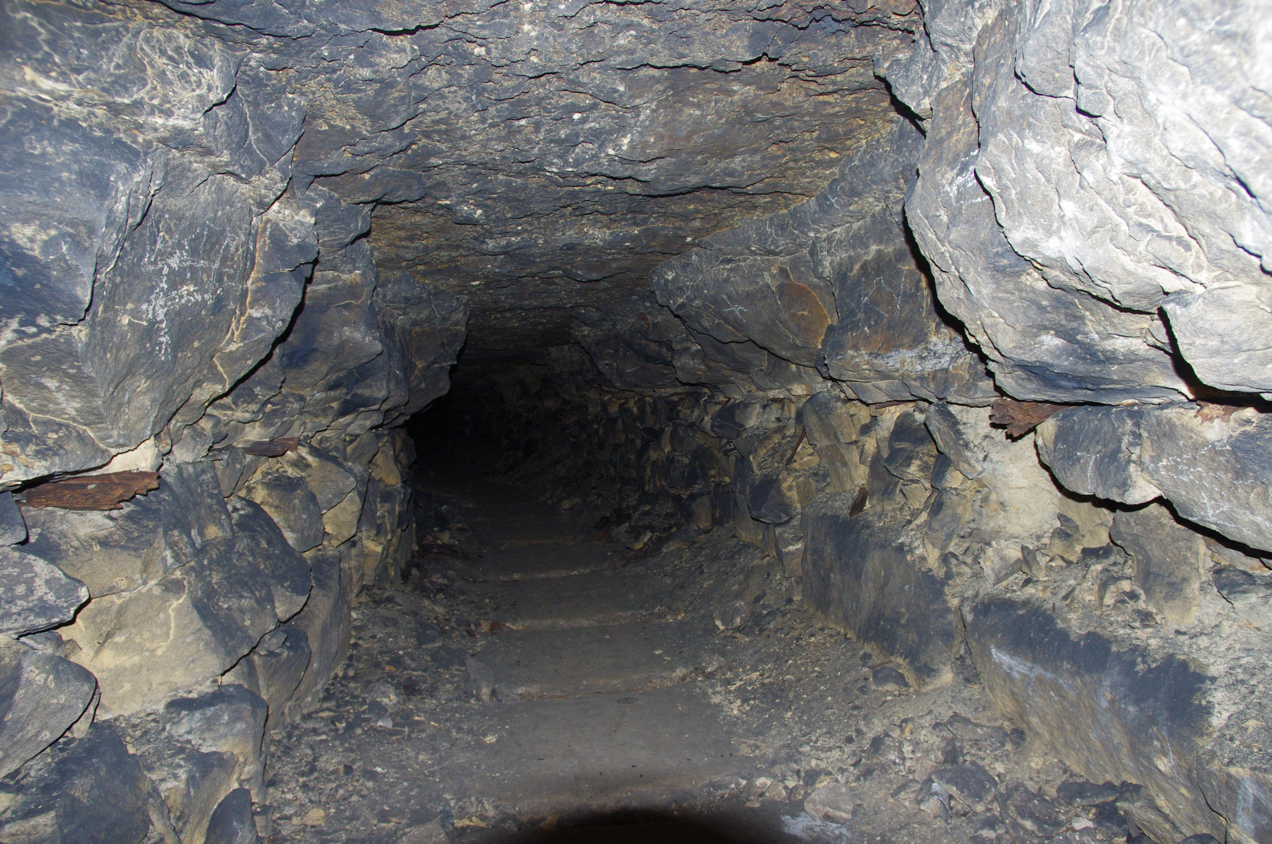 Москва, Девятовские каменоломни (Силикаты).